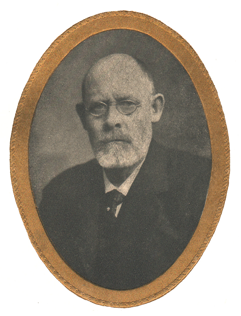 Fredrik Vilhelm Thorsson (1865-1925)